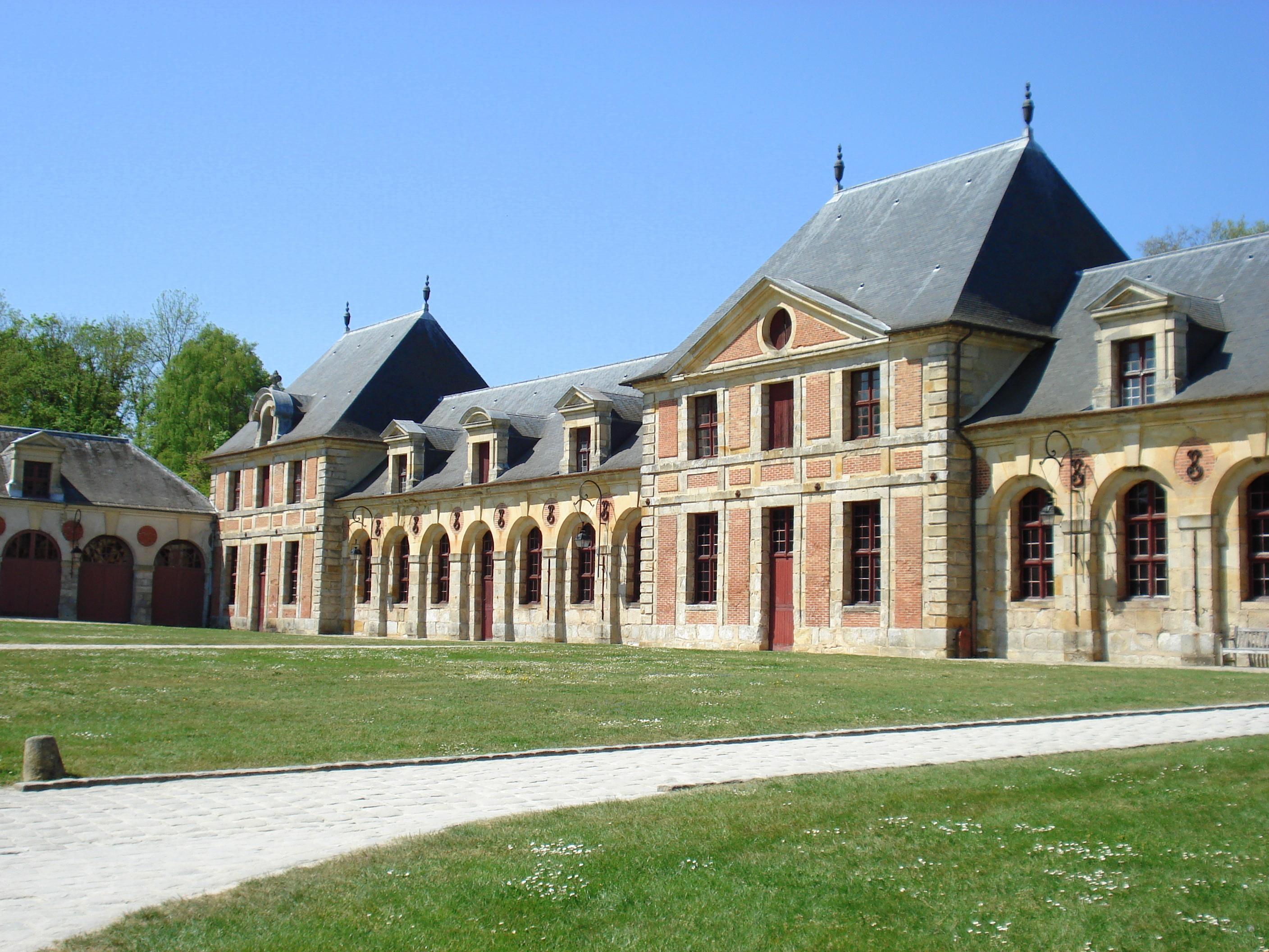 Schloss Vaux-le-Vicomte